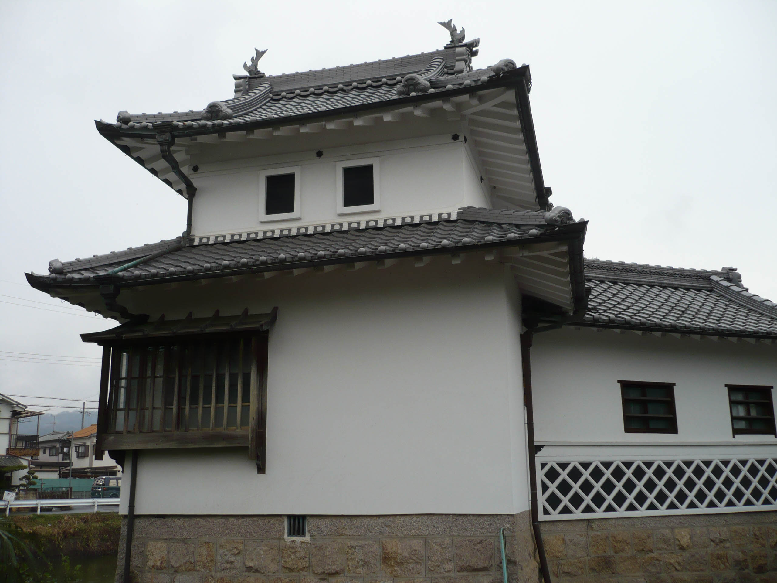 模擬櫓